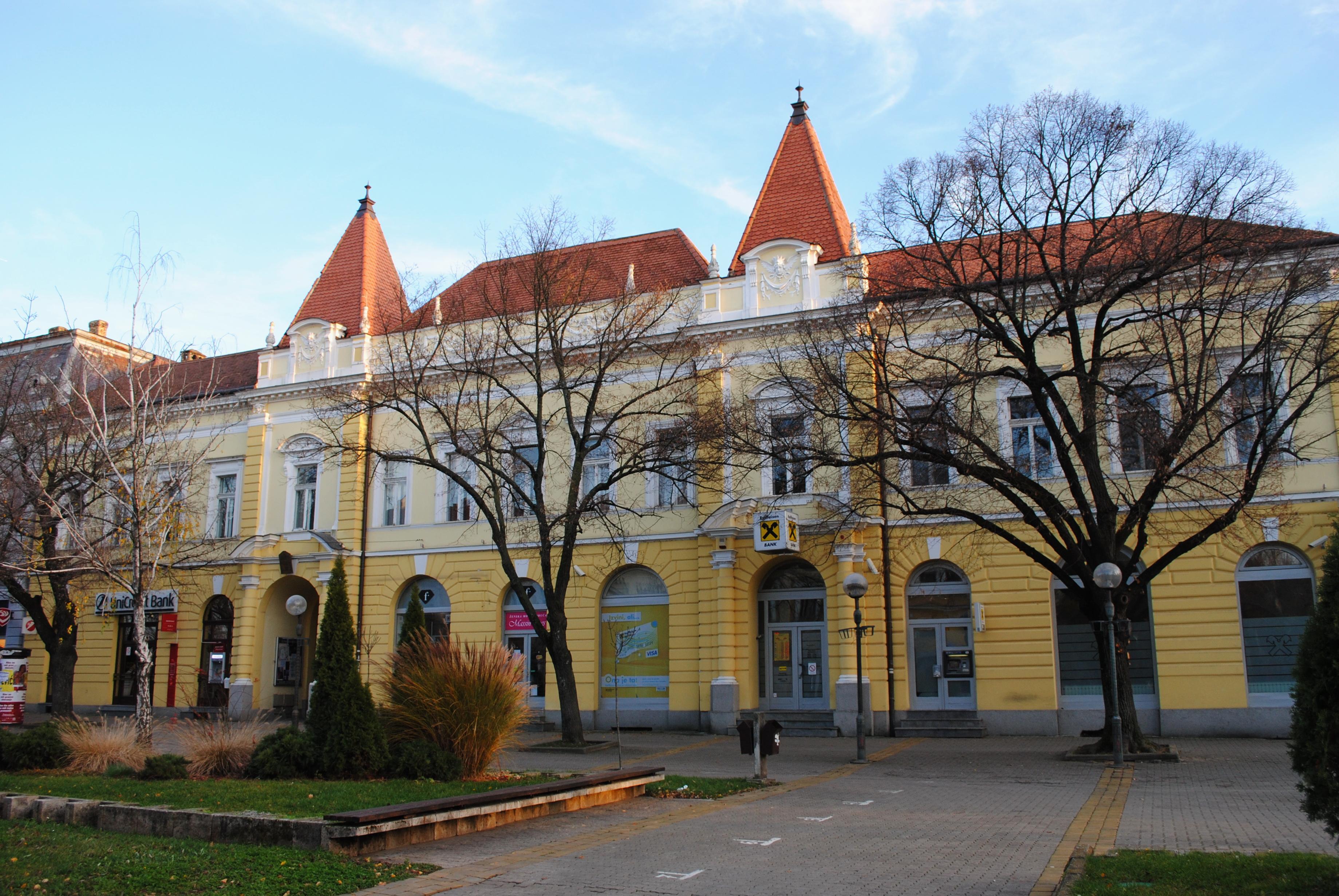 Srpski (latinica): Zgrada Narodnog pozorišta u Kikindi sagradjena 1900. Prostorno kulturno istorijska celina 62